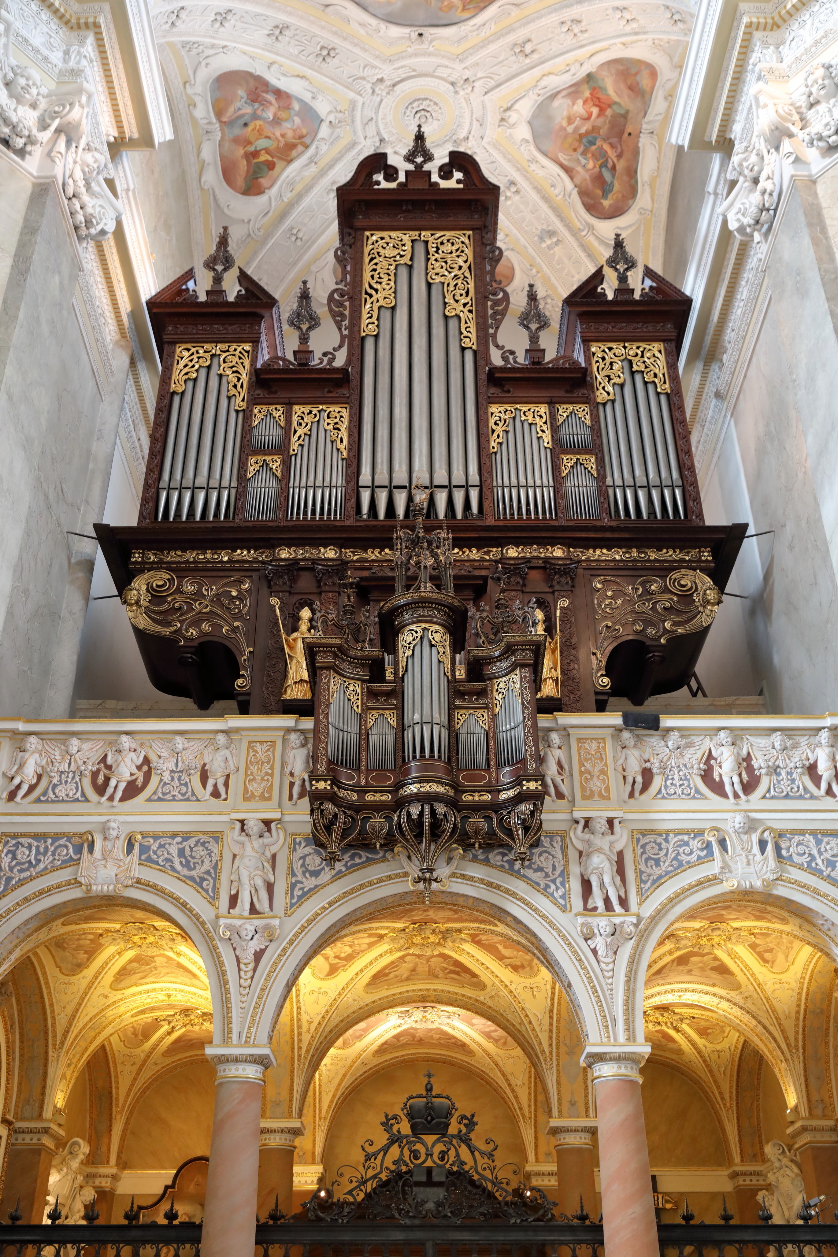 Die Festorgel der Stiftskirche des Augustiner-Chorherrenstiftes in der niederösterreichischen Stadt Klosterneuburg.Die Orgel wurde von dem Passauer Orgelbauer Johann Georg Freundt in den Jahren 1636 bis 1642 gebaut und gilt als das älteste original erhaltene Monumentalorgelwerk. Sie besitzt drei Manuale und Pedal mit 35 Registern und 2179 Pfeifen, die sämtlich aus Zinn gefertigt sind.